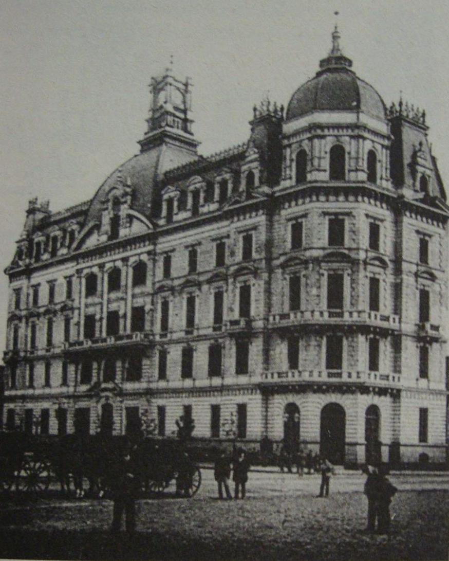 Vista del Palacio Municipal de la ciudad de Buenos Aires hacia 1900. Aun no se habían comenzado las obras de la ampliación hacia la calle Rivadavia, y se puede ver una puerta en la esquina de Avenida de Mayo y Bolívar que fue tapiada en 1955. Barrio de Monserrat, ciudad de Buenos Aires, Argentina.